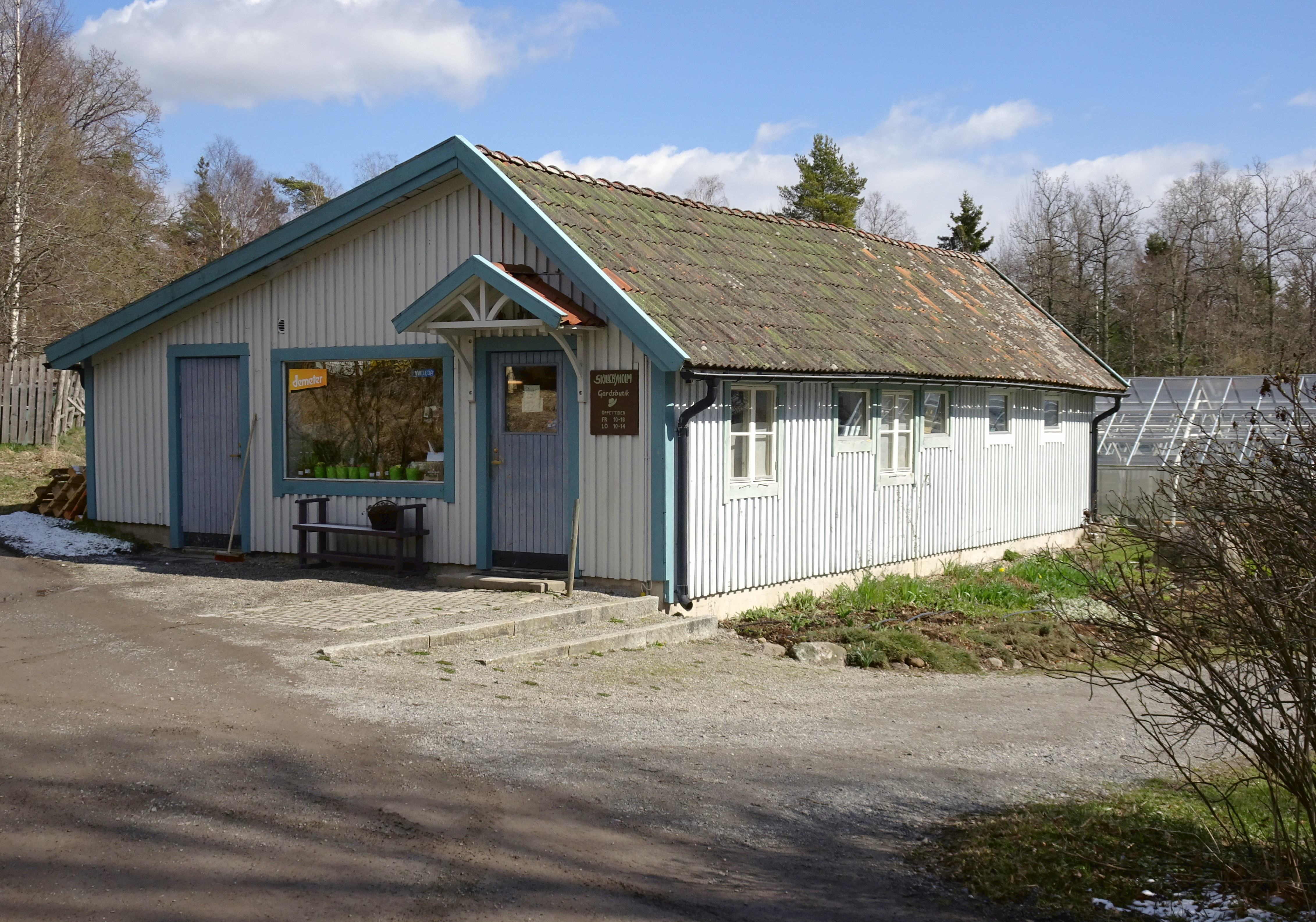 Skillebyholm, gårdsbutik